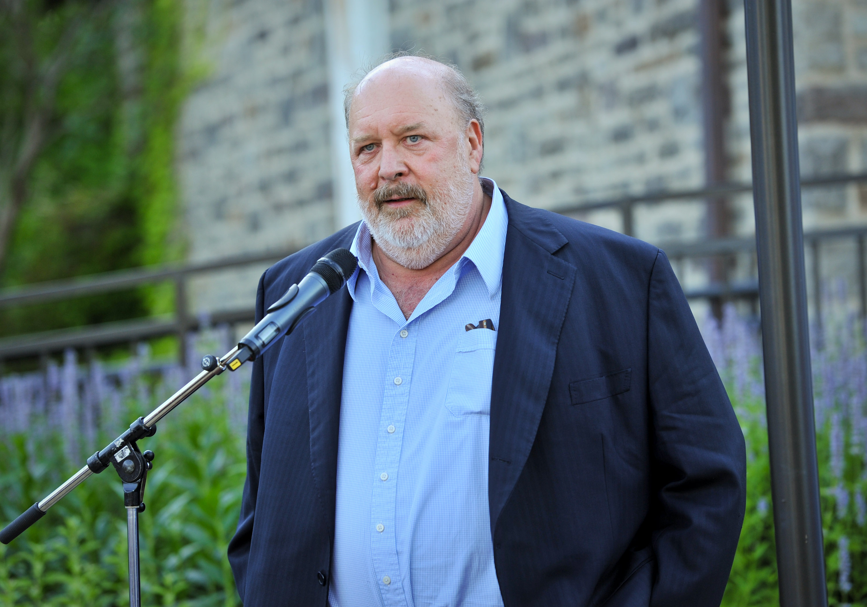 SS2_8040